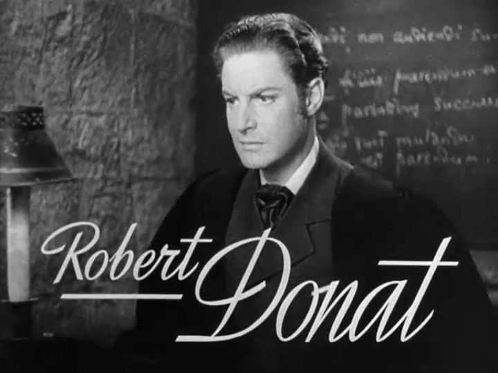 1939年製作の映画『チップス先生さようなら』の予告編動画より。1870年、25歳時のチップス先生を演じるロバート・ドーナット